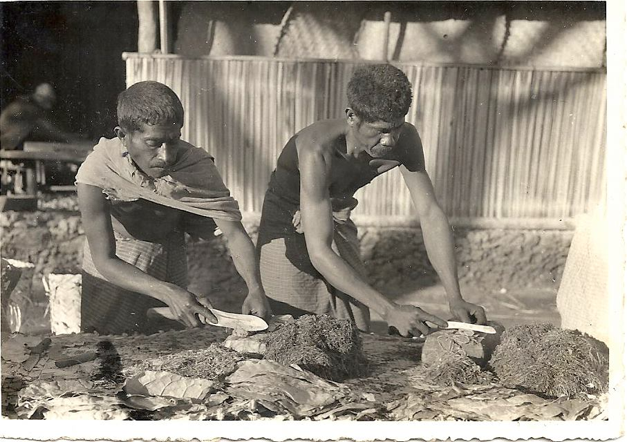 Tabak in Balibo, 1930er Jahre